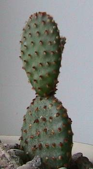 kaktusas